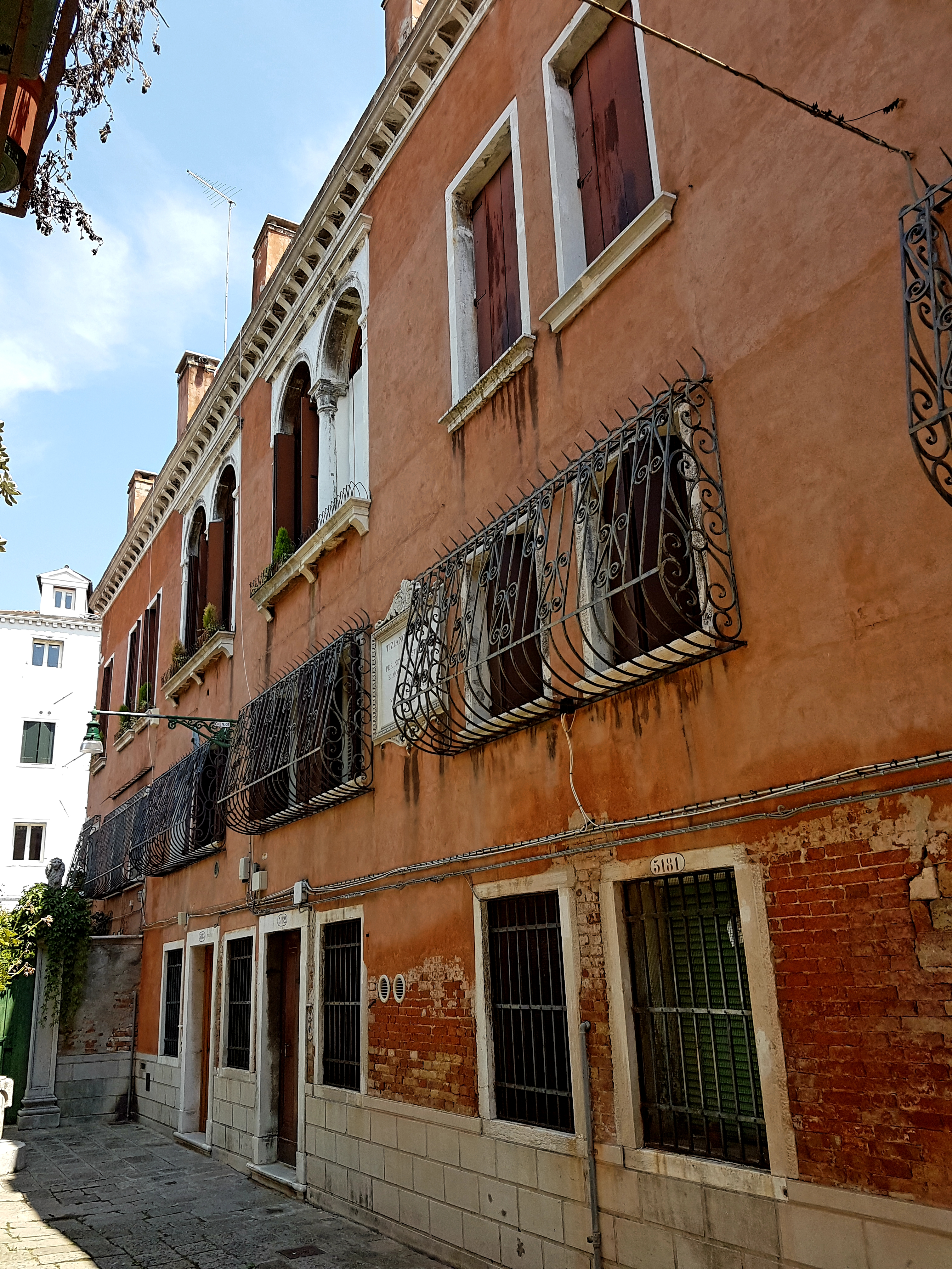 Venedig-Cannaregio, Tizian's Wohnhaus am Campo del Tiziano im Nordosten von Cannaregio